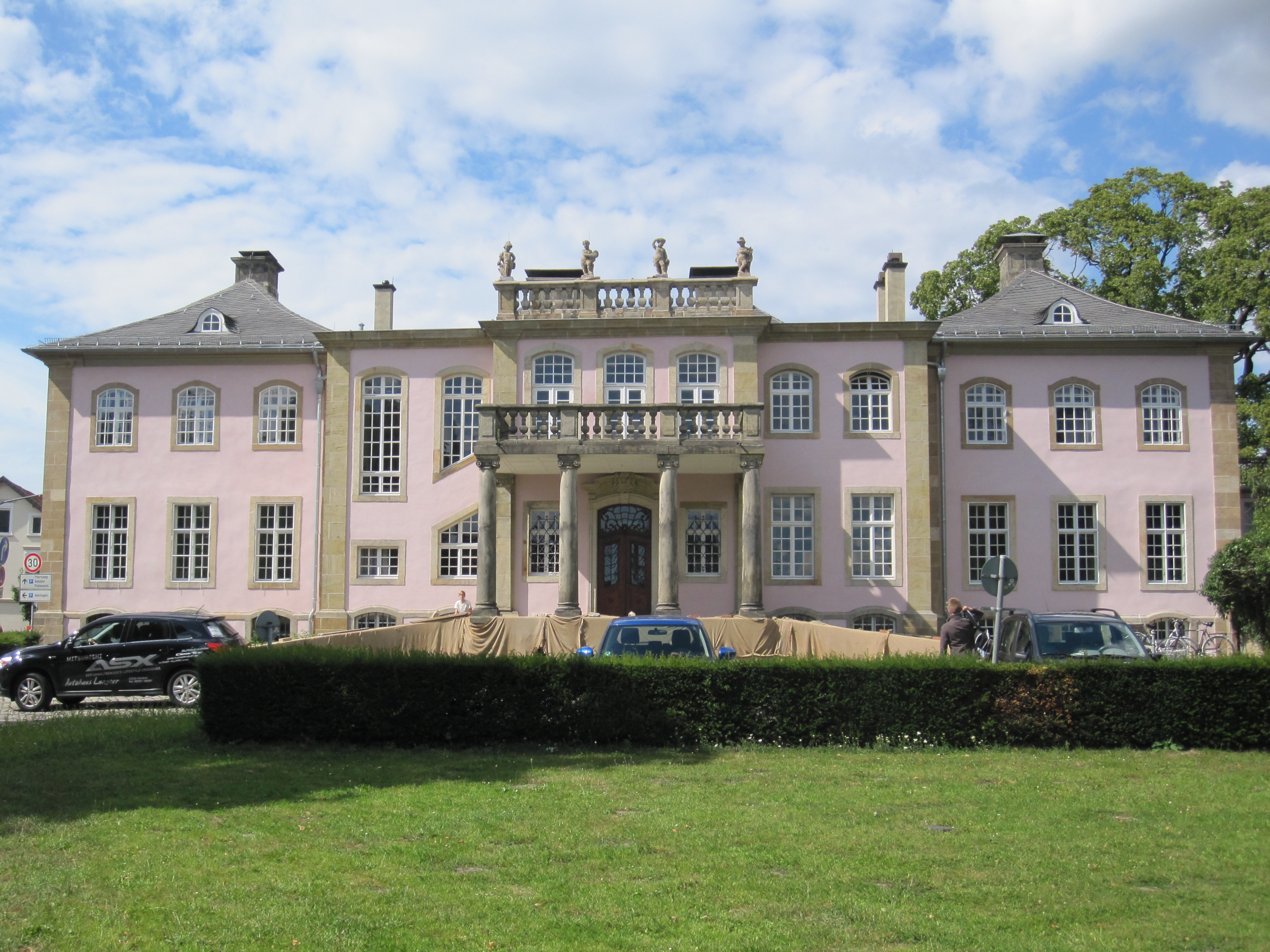 Schloss Stietencron nach Renovierung und Neuanstrich der Außenfassade. Standort Schötmar / Bad Salzuflen